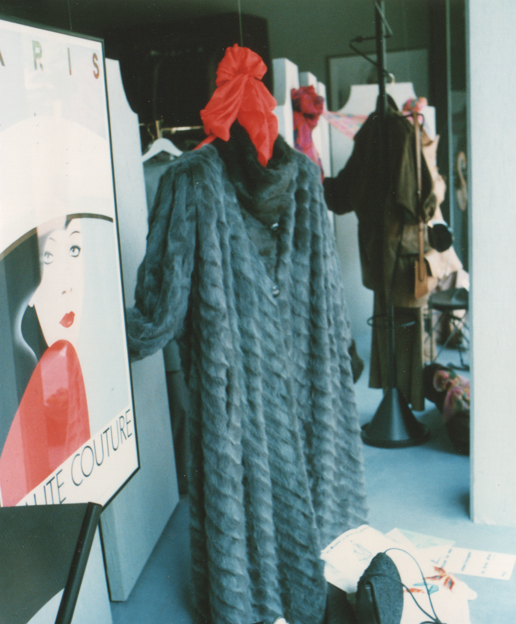 Pelzatelier Schöller, Gütersloh, Spiekergasse. Fehwammenmantel (Vintom) mit Fehrückenkragen und -manschetten, gefärbt. Design und Realisation Pelzmodelle Kuhn, Düsseldorf.